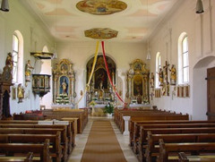 Innenraum